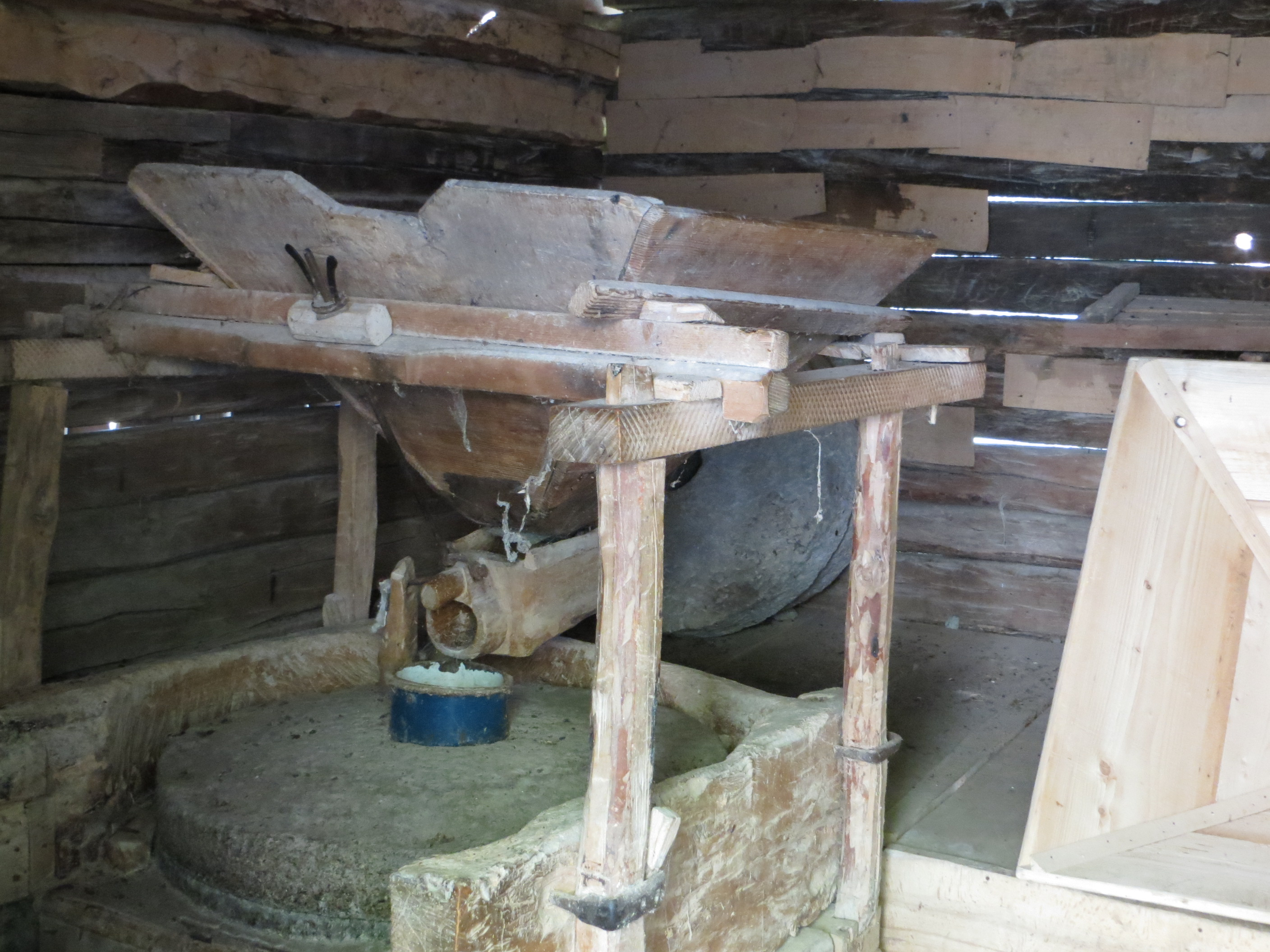 Ansamblul de mori din Eftimie Murgu - interior cu dispozitivul de măcinat 06